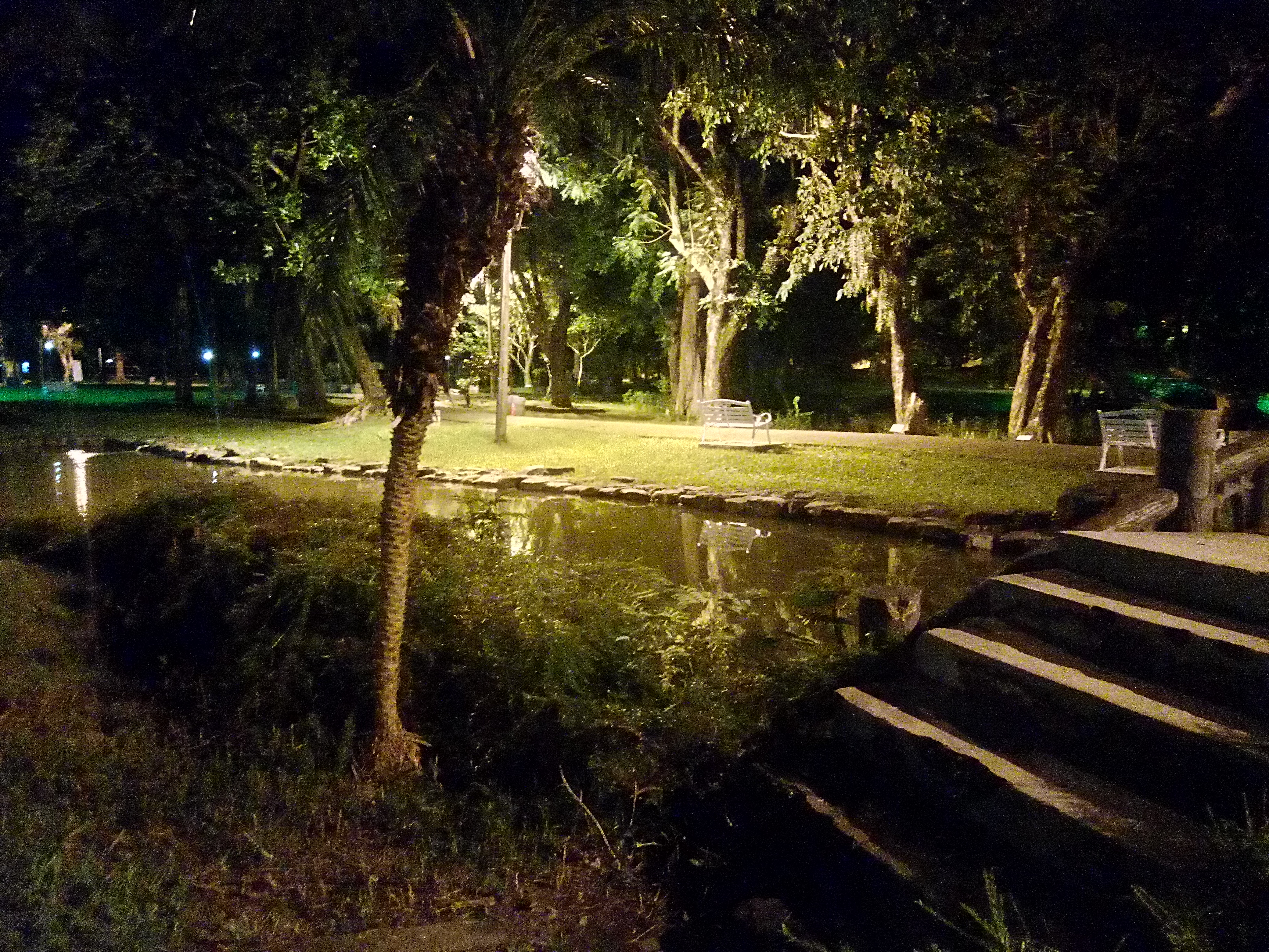 嘉義公園小西湖の夜景(北側にて)